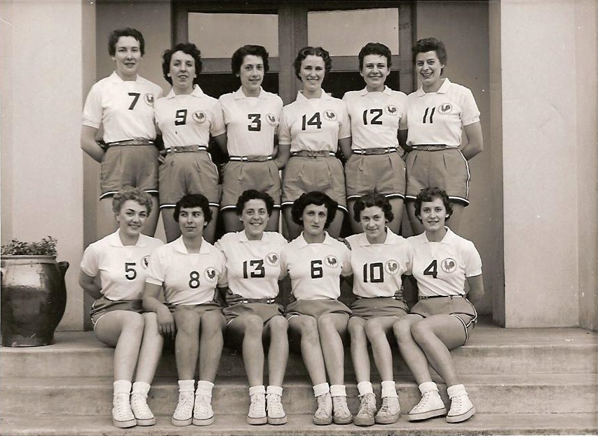 French women's basketball team 1953: Anne-Marie Colchen (#7), Édith Tavert-Kloechner (#9), Gisèle Roques (#3), Alice Sellier (#14), Paulette Neyraud (#12), Andrée Henry-Lucq (#11), Evelyne Golhen (#5), Eliane Savelli (#8), Micheline Bejaud (#13), Jacqueline Biny (#6), Odette Roques (#10), Thérèse Marfaing (#4).